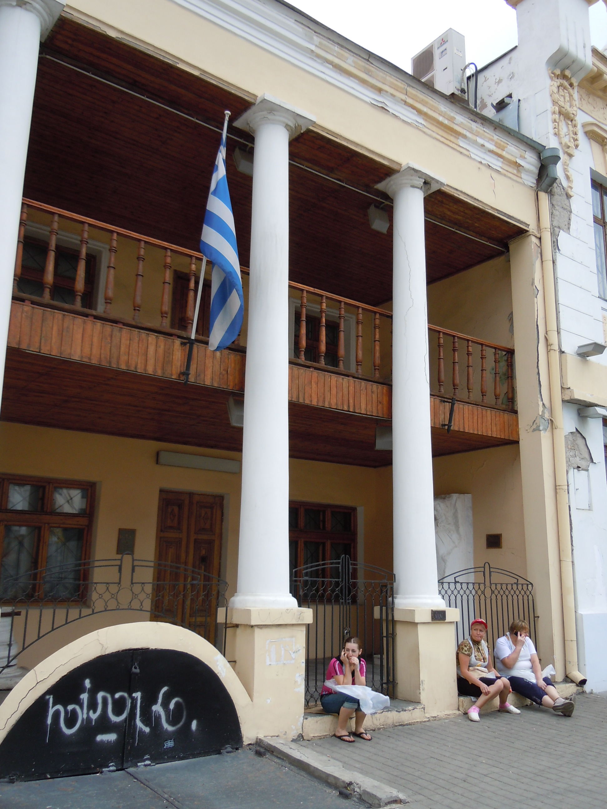 Будинок, де містився центр таємного грецького товариства “Філікі Етерія”